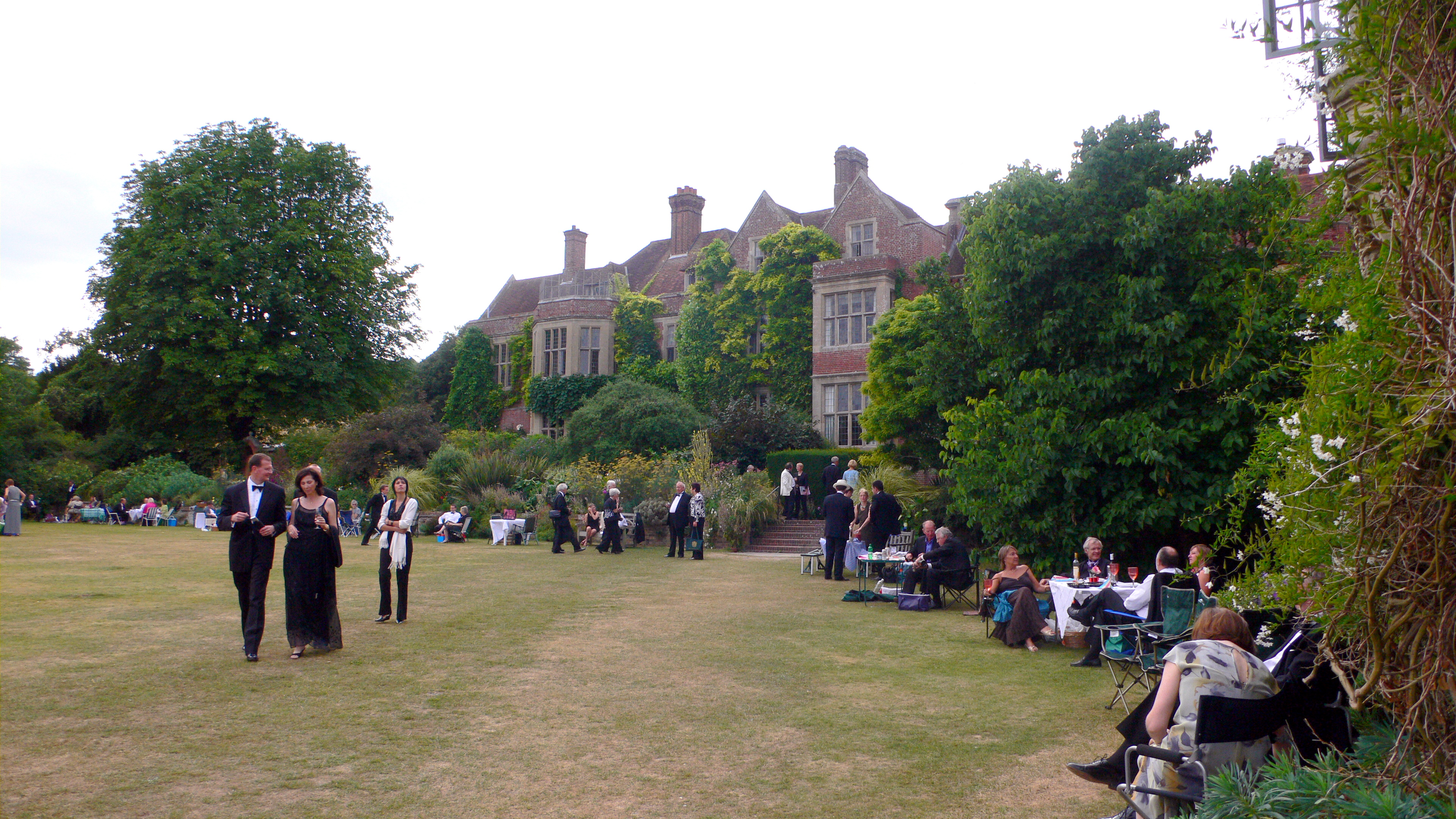 Glyndebourne HouseGlyndebourne